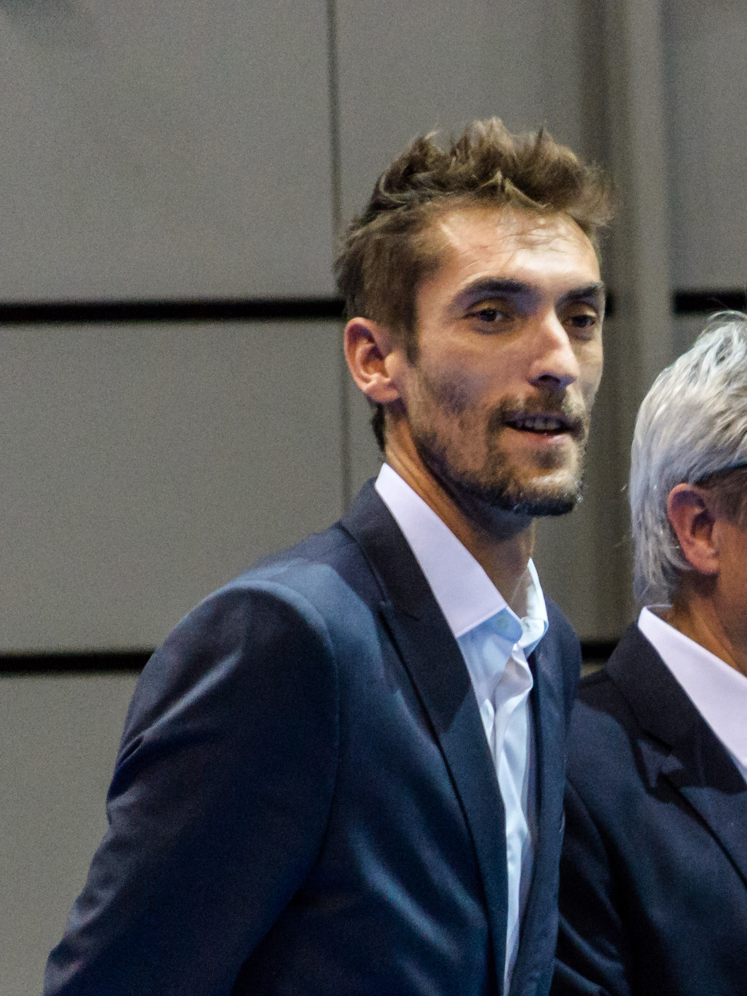 Rencontre entre Norbert Gombos et Yannik Reuter en finale de l'Open Brest Arena le 23 octobre 2016. Le Slovaque Norbert Gombos remporte le tournois en deux sets, 7-5, 6-2.